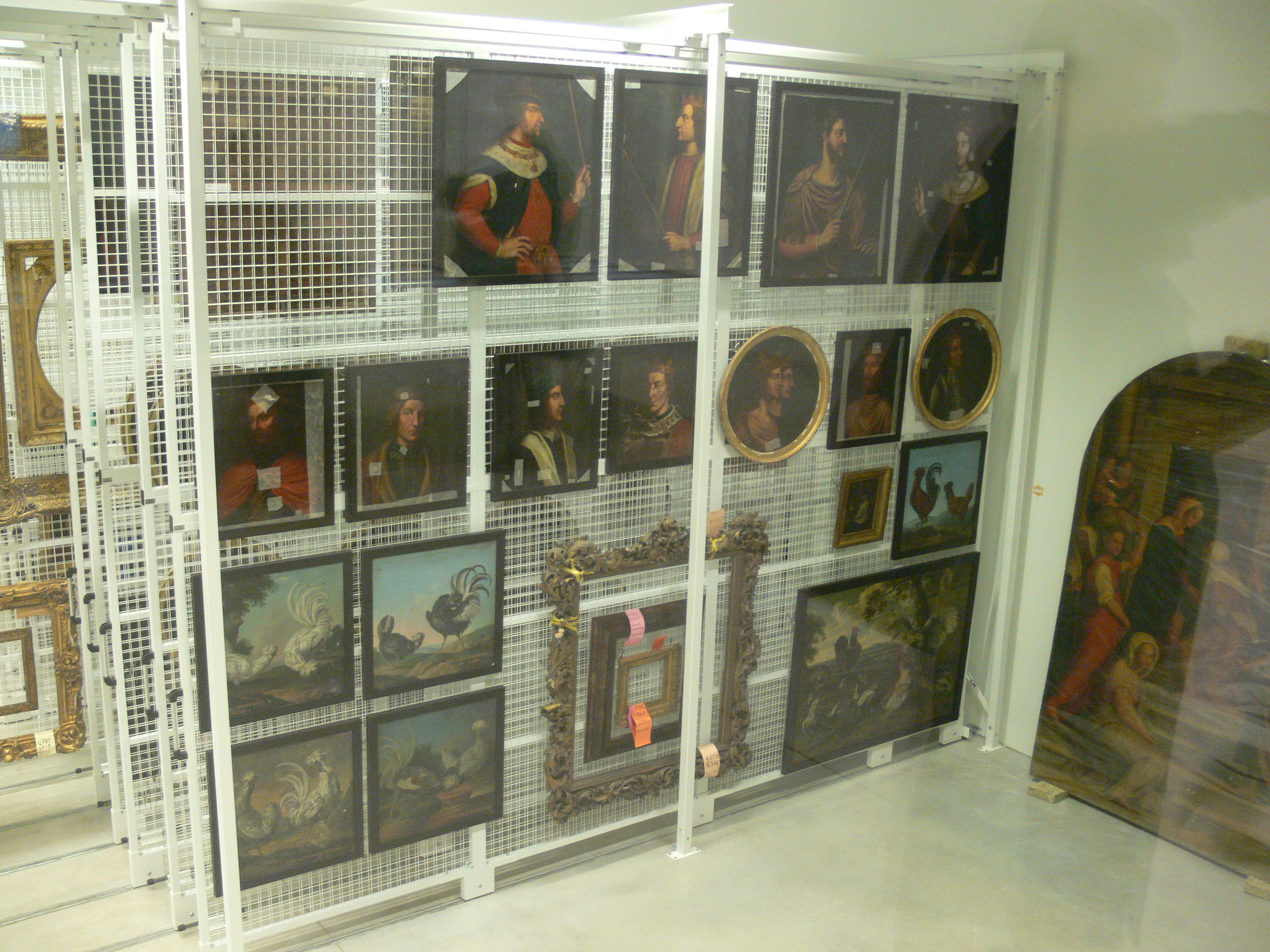 Réserves du Louvre-Lens